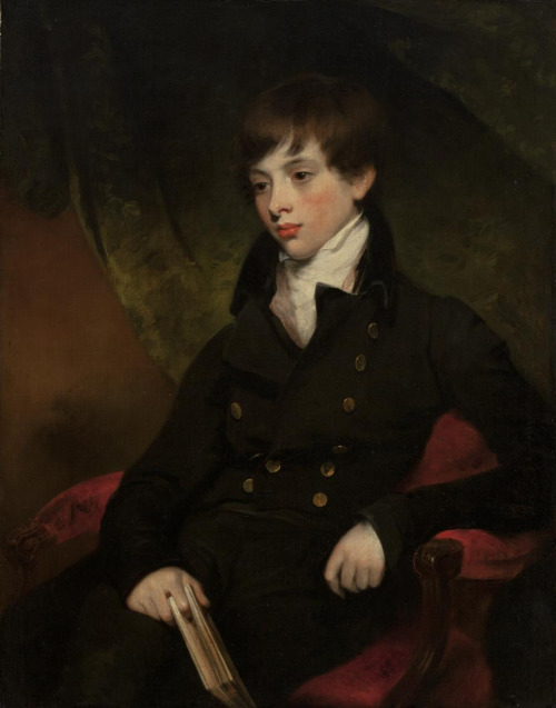 William Owen. Trevor Plowden. 1790-е годы